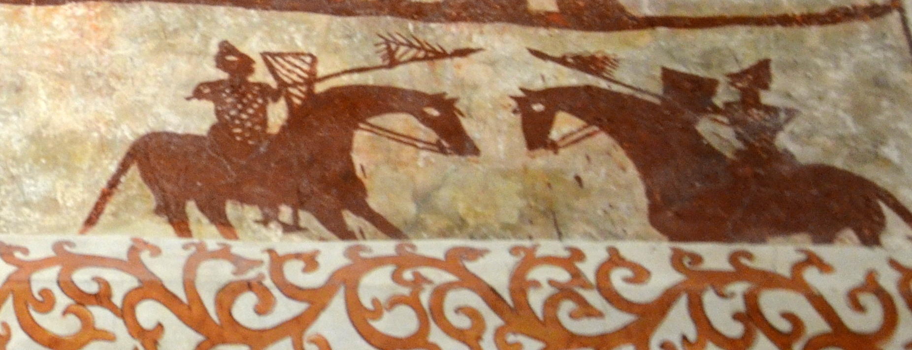 Alaitzako eliza erromanikoa, bere margolan ikusgarri bezain bereziekin.